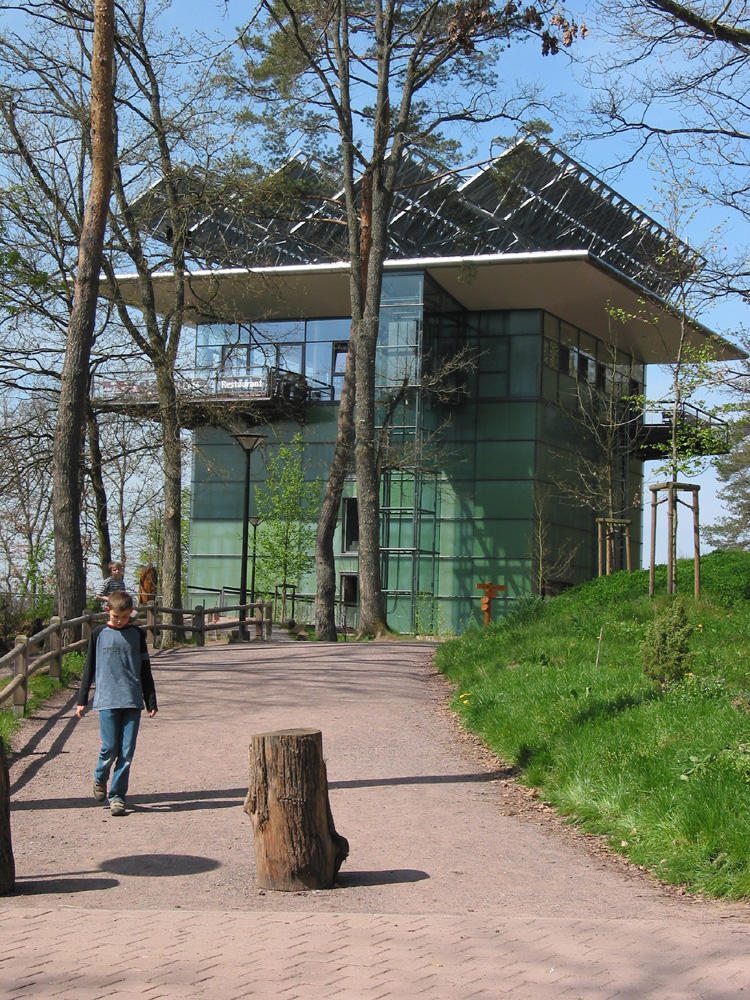 Description: Bioaphärenhaus Source: Selbst fotografiert, 30.04.2005 in Fischbach Photographer/Painter: Ralf Ziegler, --RalfZi 18:06, 3 May 2005 (UTC)